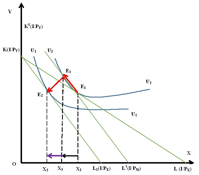 При увеличении цены оптимальное положение потребителя смещается на более низкую кривую безразличия U1U1. Общий эффект повышения цены товара X - это снижение его потребления с ОХ1 до ОХ2 (Х2Х1). Эффект замены - это разница OХ1 и ОХ3 (Х3Х1), эффект дохода - это разница ОХ3 и ОХ2 (X2X3). Эффект замены определяется движением вдоль одной и той же кривой безразличия, а эффект дохода - переходом с одной кривой на другую. Эффект дохода усиливает действие эффекта замены, увеличивая потребление товара X при снижении его цены и сокращая потребление при повышении цены